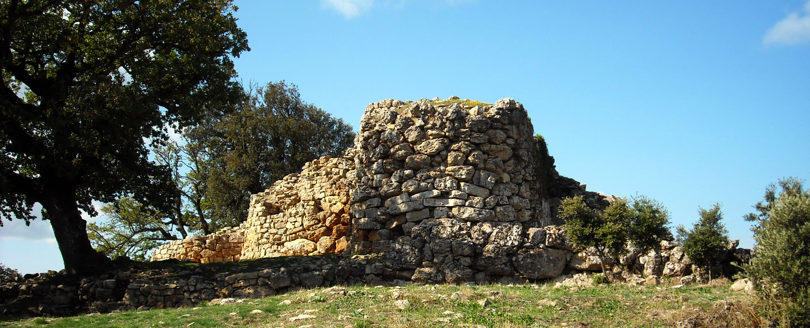 Villanovatulo, Sardegna, Italy